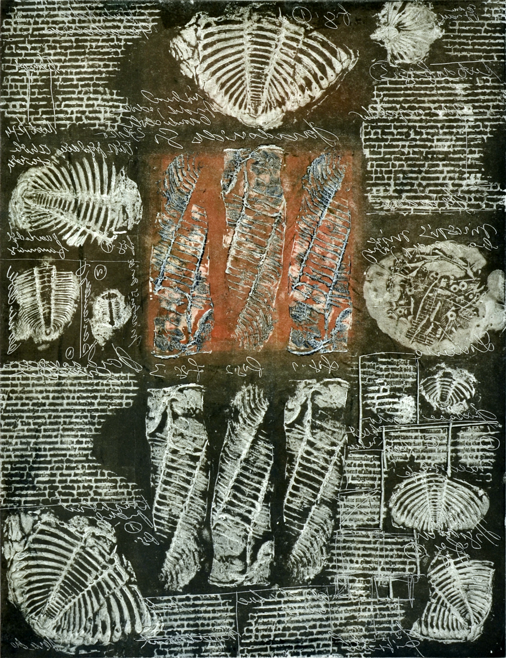 Oldřich Hamera, Sbírka konfrontace, monotyp, 44,5x34cm, 1985